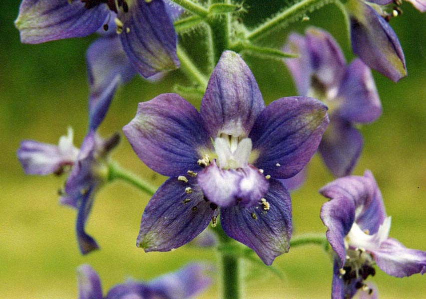 Delphinium staphisagria